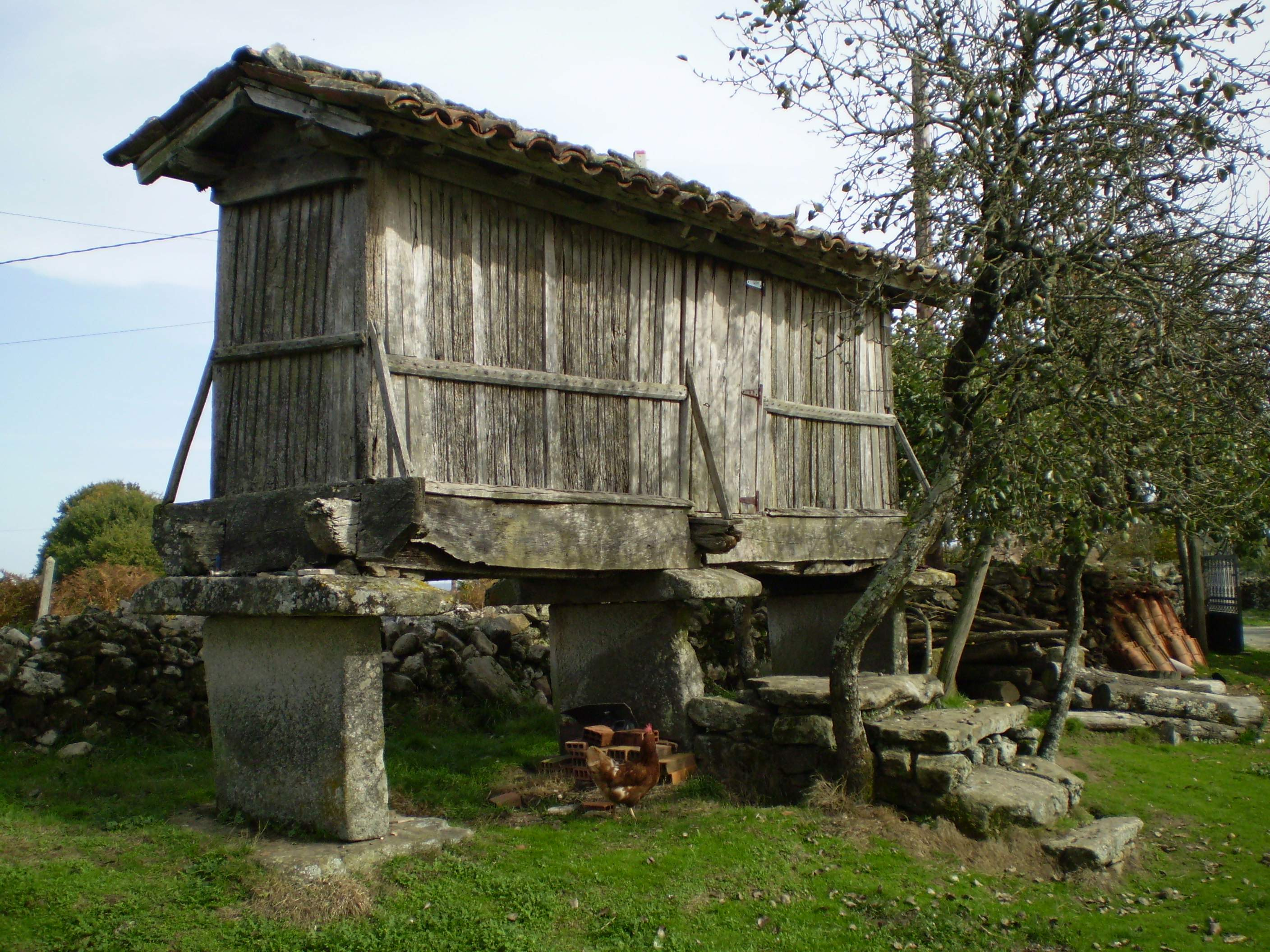 Hórreo de madeira en A Vilapequena (Antas de Ulla)